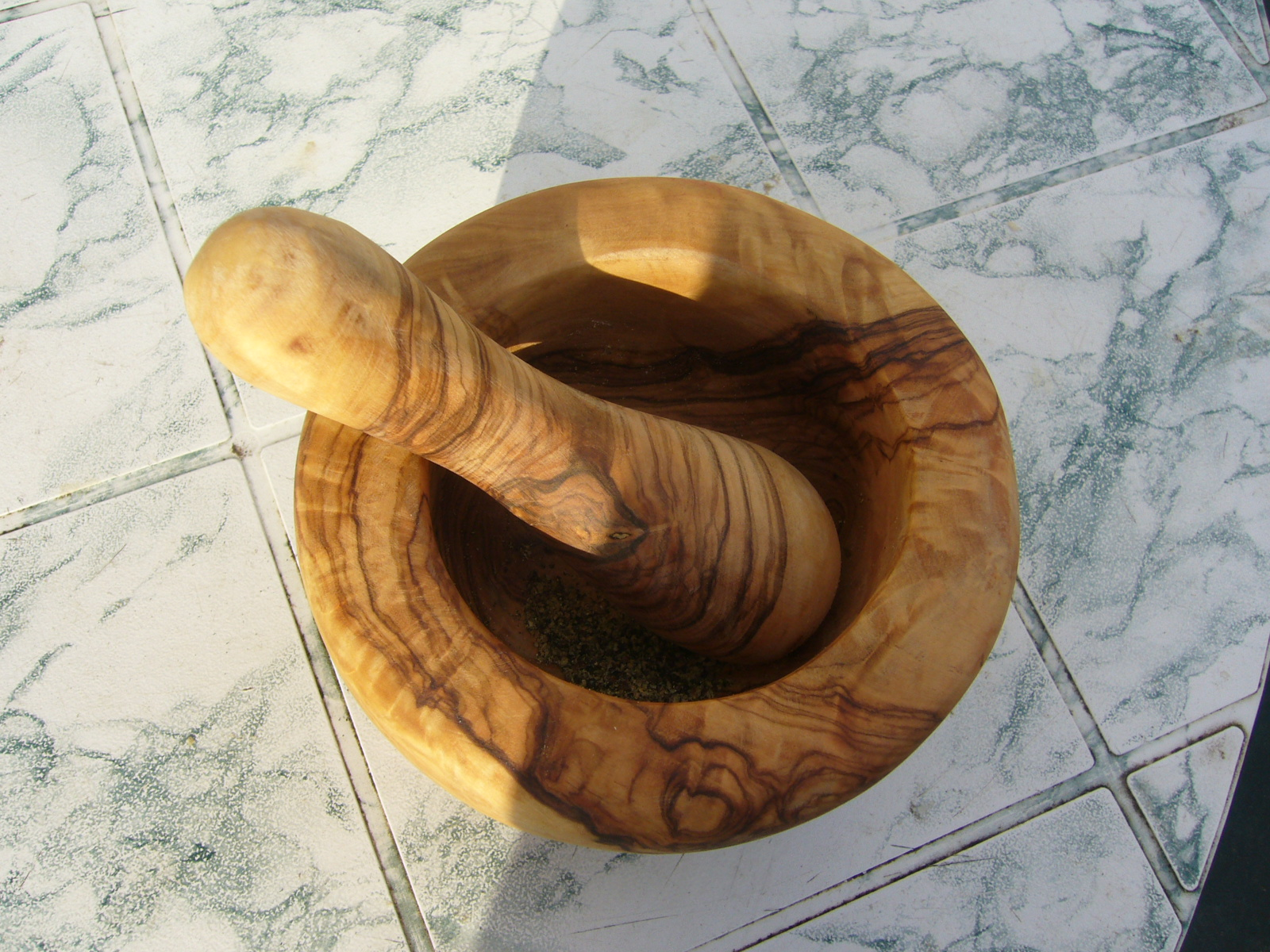 Un mortier et pilon en bois d'olivier, fabrication artisanale à la main.